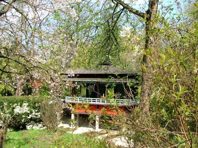 Cluj-Napoca Botanical Garden - Japanese Garden